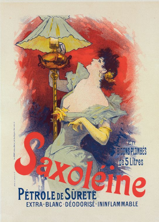 Affiche pour la "Saxoléine" (Safety petroleum)